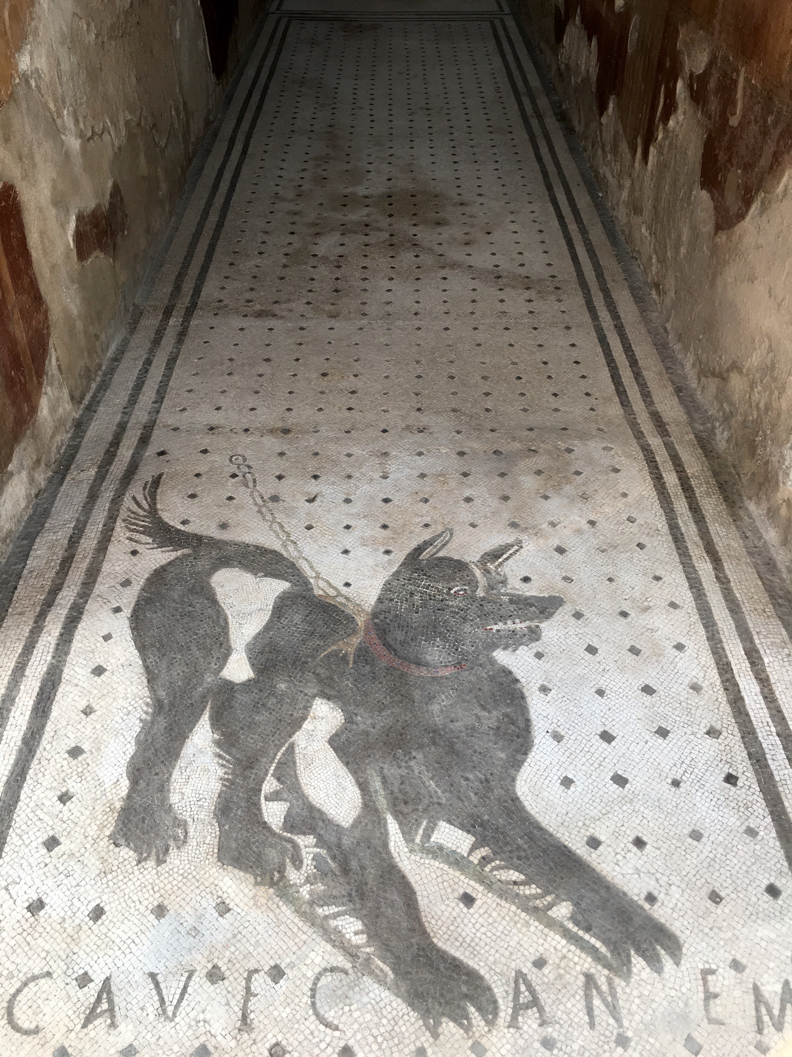 Pompeya. Casa del Poeta Trágico. Mosaico en la entrada.